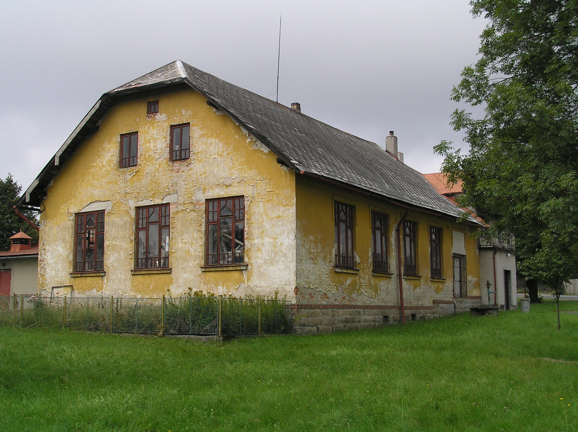 Čížkovice 1.díl 16, Maršovice